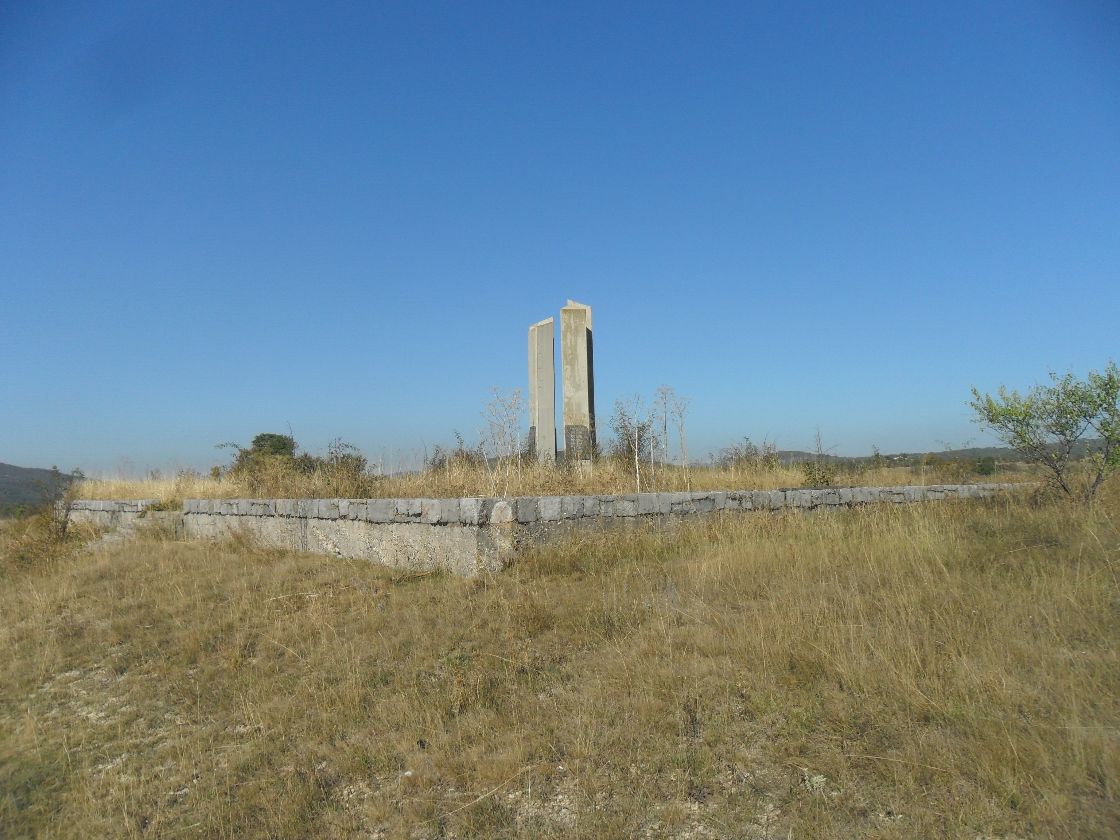 Spomenik na putu u Srednju Goru